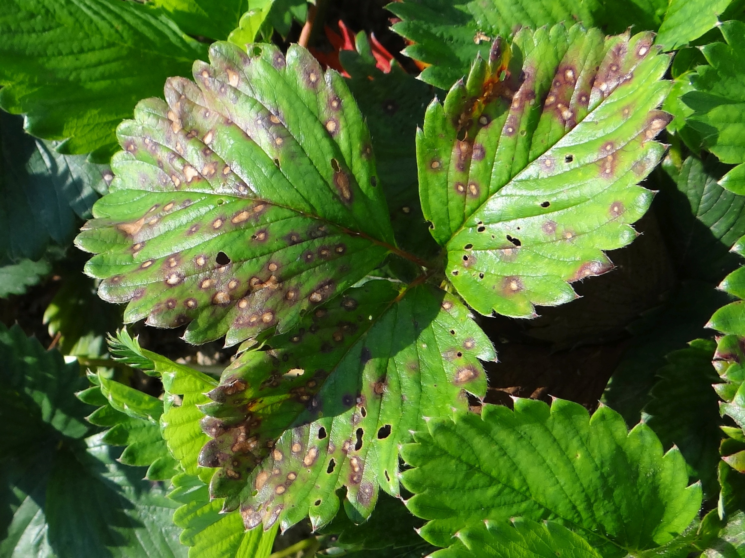 Ramularia grevilleana (synonim = Mycosphaerella fragariae) on Fragaria vesca